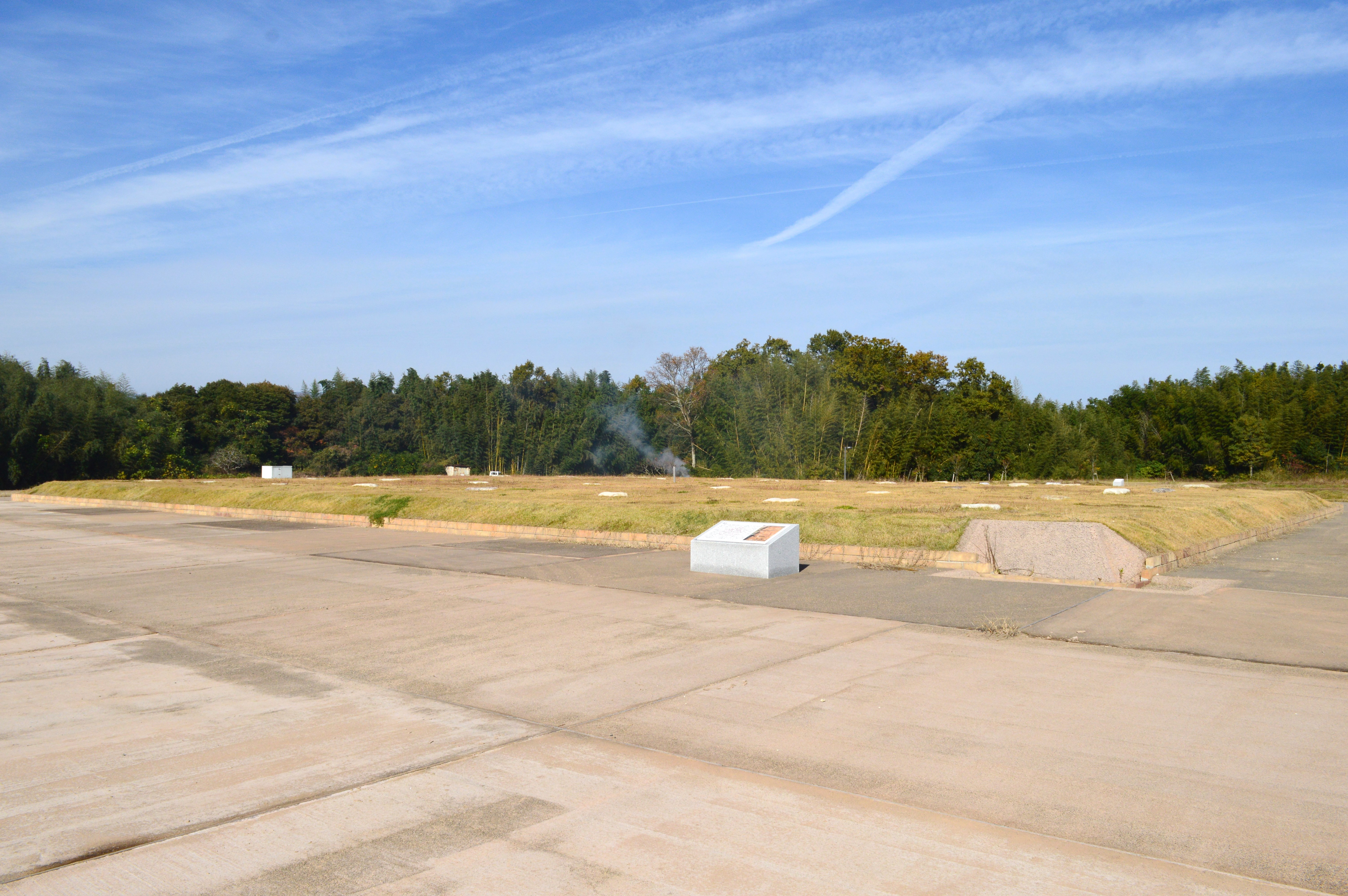 伊勢国分寺跡 講堂